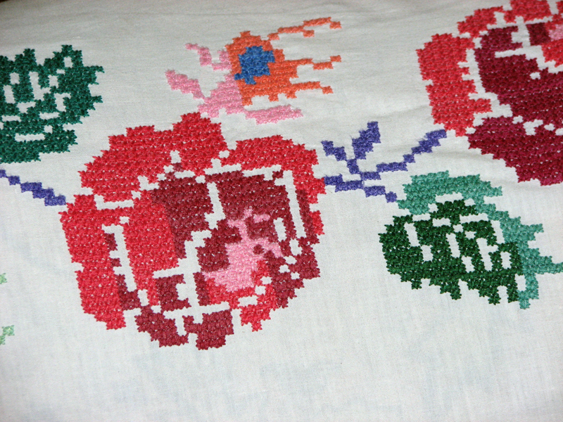 Вышивка крестом